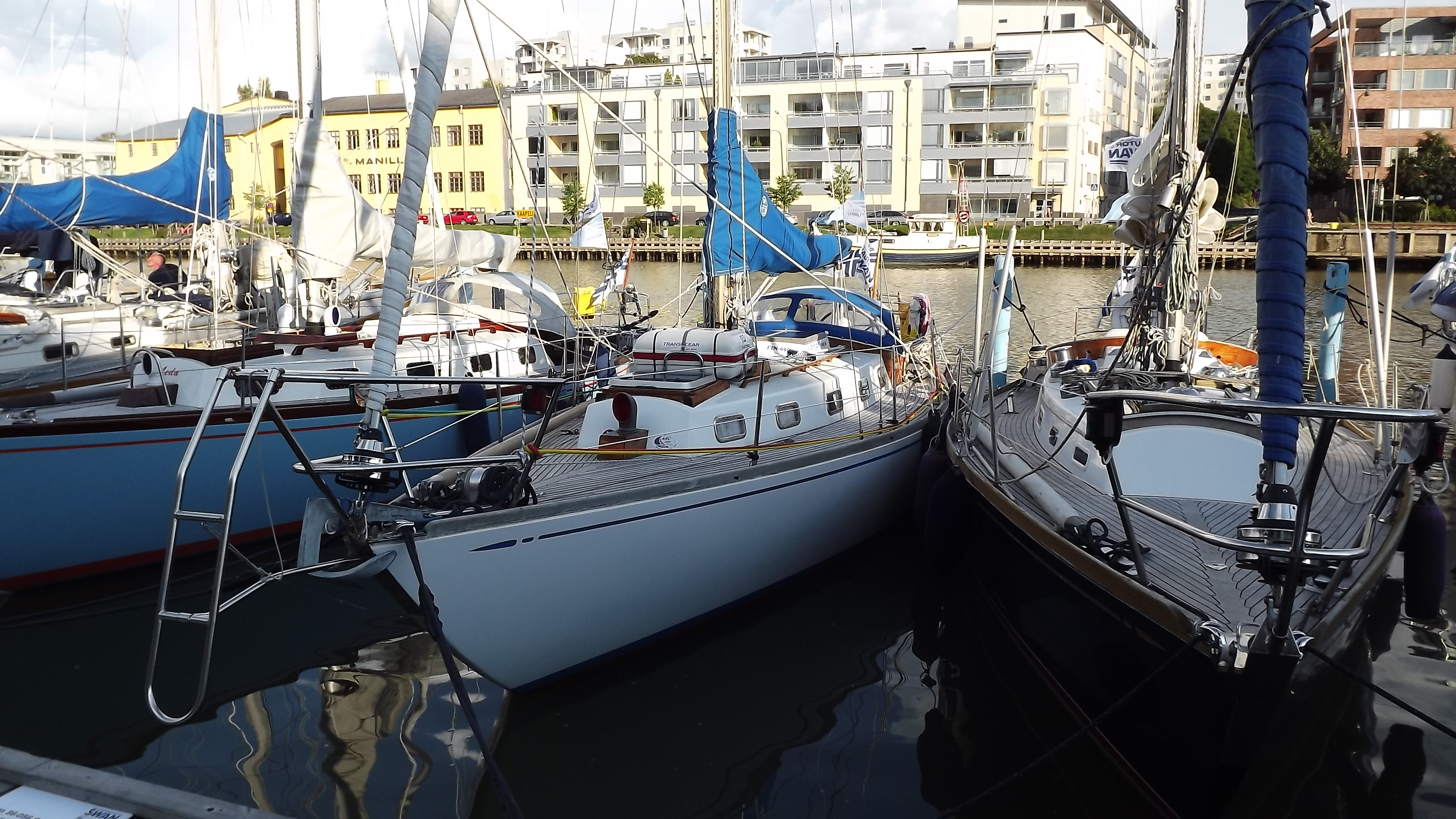 Tre Swan 36:or i Åbo gästhamn (Leda, Cantana och Fågel Blå), Swan Archipelago Regatta 2012. Swan 36 ritades av Sparkman & Stephens och tillverkades i 91 exemplar 1967-1970.